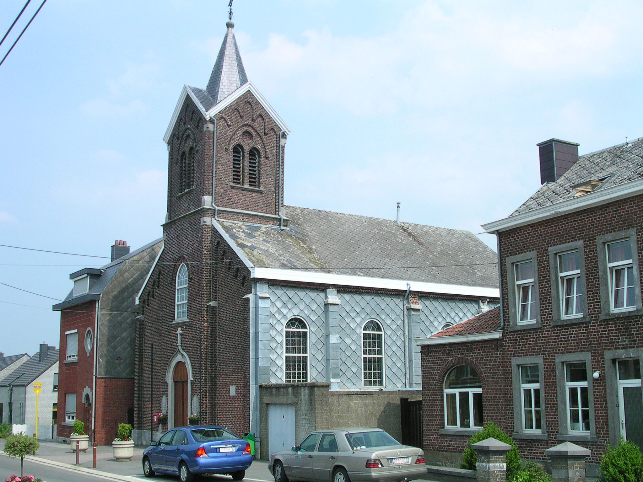 Kirche von Elsaute